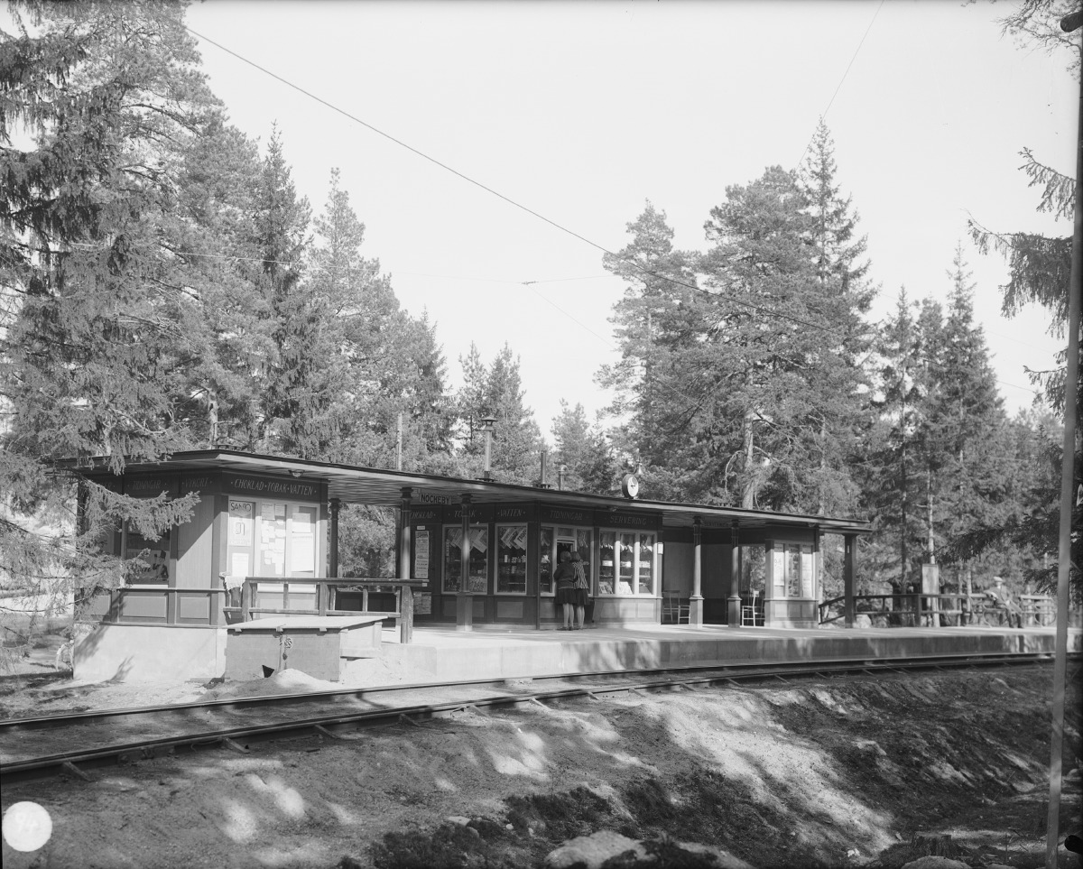 Nockeby i Bromma. Spårvagnshållplats Nockeby, foto från 1931. Fotonummer SM 2030-94. Publicerat av Spårvägsmuseet.